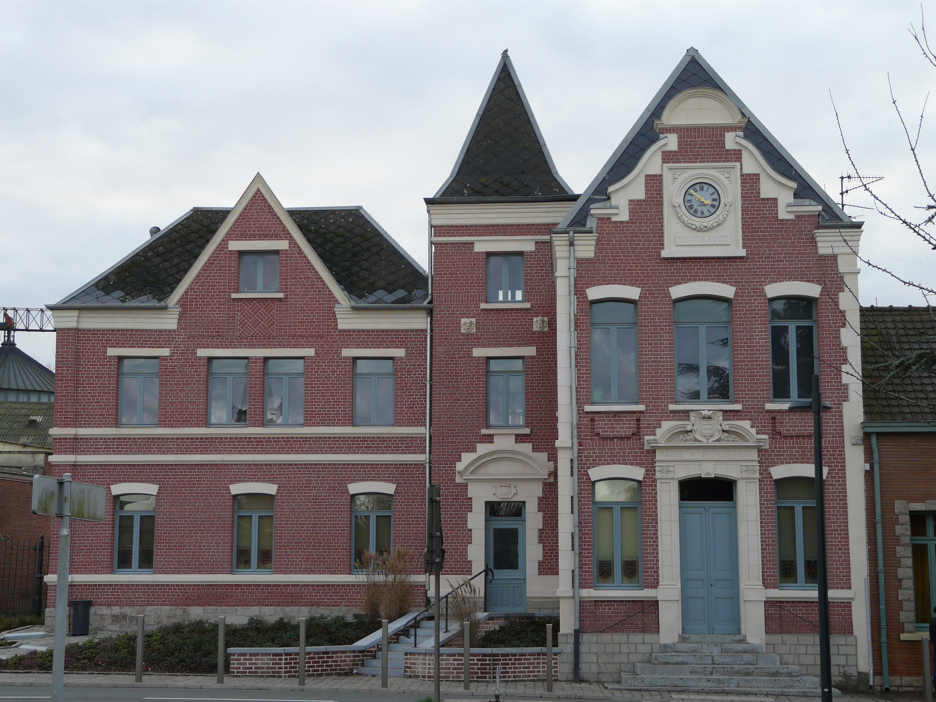 La mairie d'Aubencheul-au-Bac (Nord)